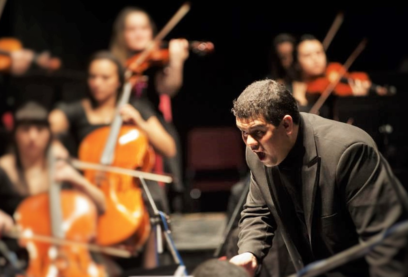 El Mtro. Ariel Britos dirigiendo la Orquesta Juvenil del Sodre, en Montevideo.